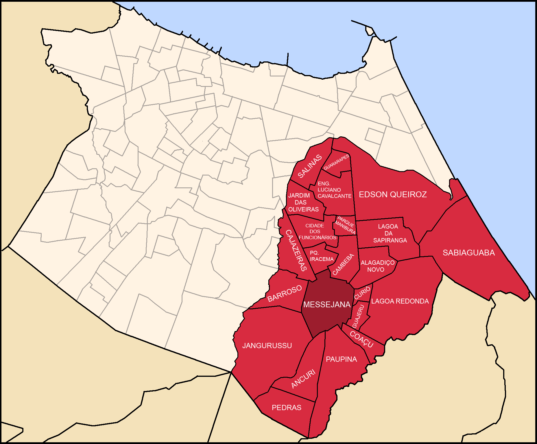 Mapa com destaque o Distrito de Messejana e os bairros adjacentes